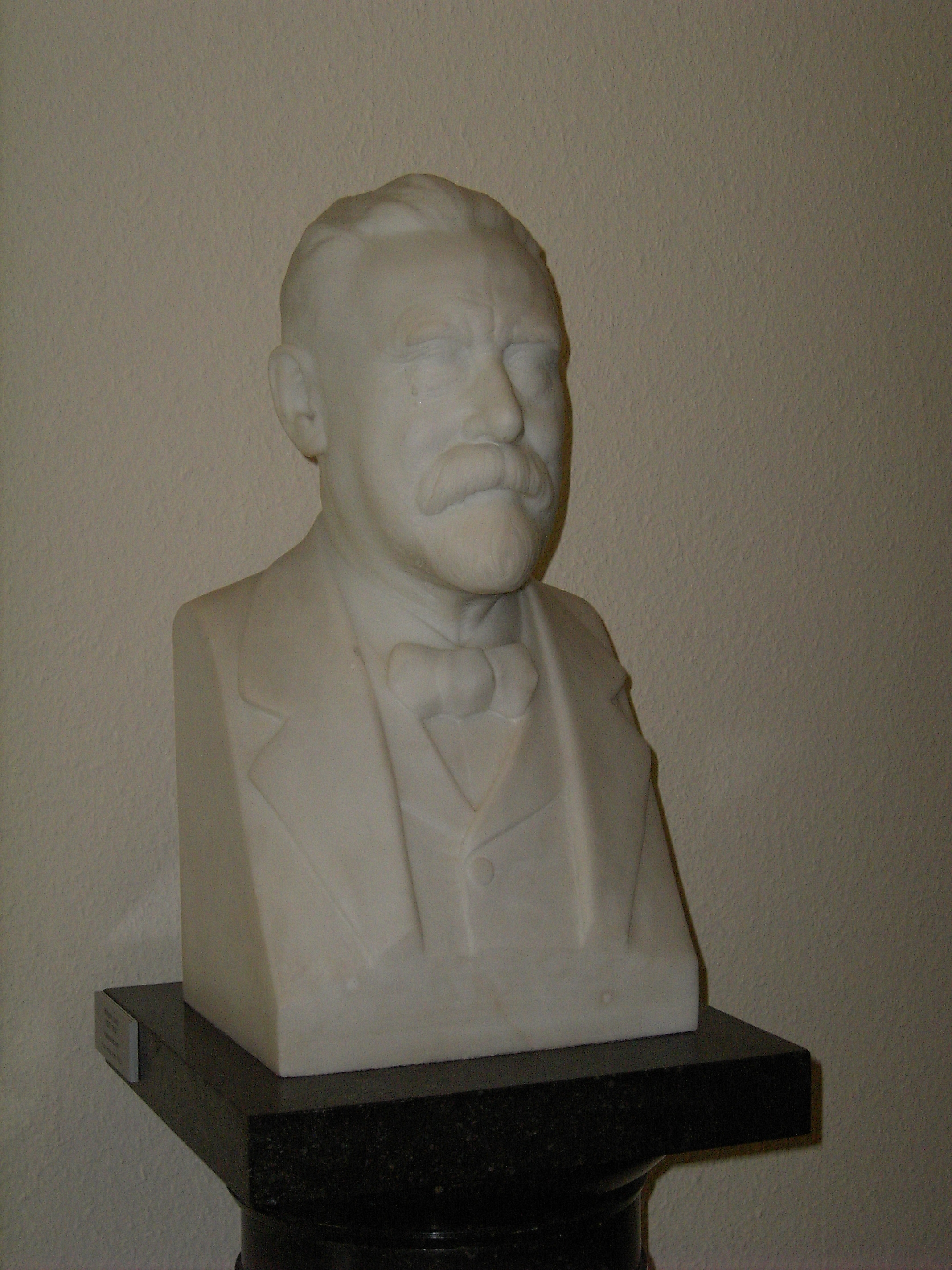 Büste des Volkswirts Wilhelm Lexis. Die Büste wurde 1912 geschaffen.